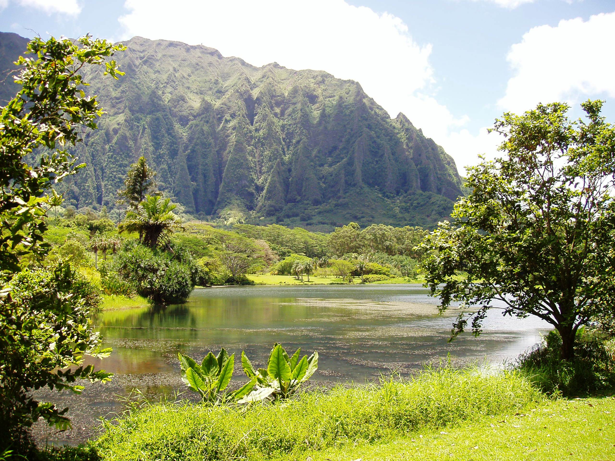 Ho'omaluhia Botanical Garden, Oahu, Hawaii - lake view.